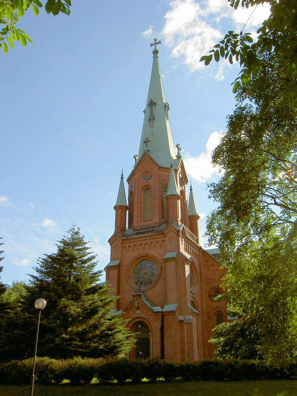 Alexander Church in Tampere, Finland